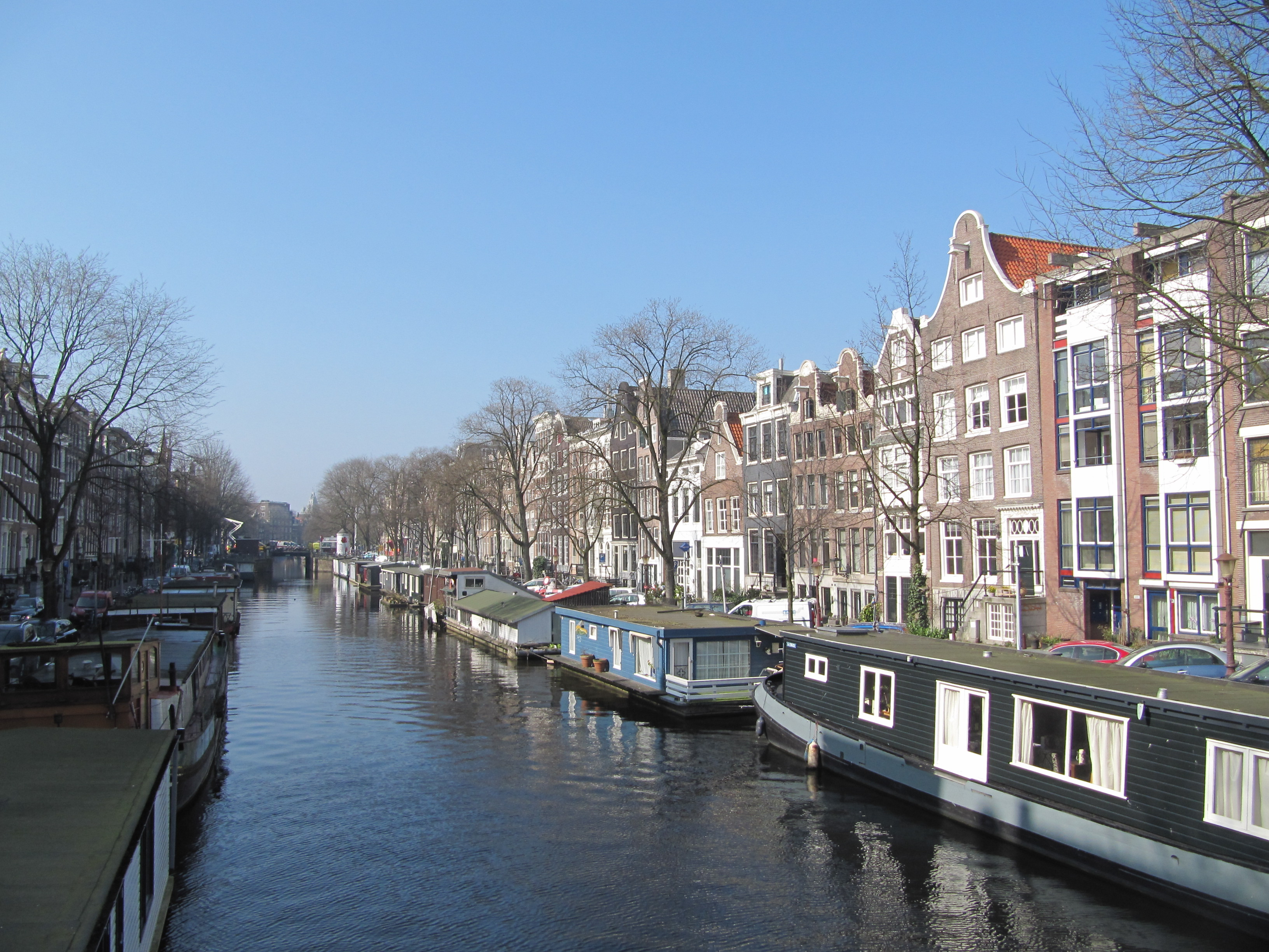 Amsterdam Prinsengracht.jpg